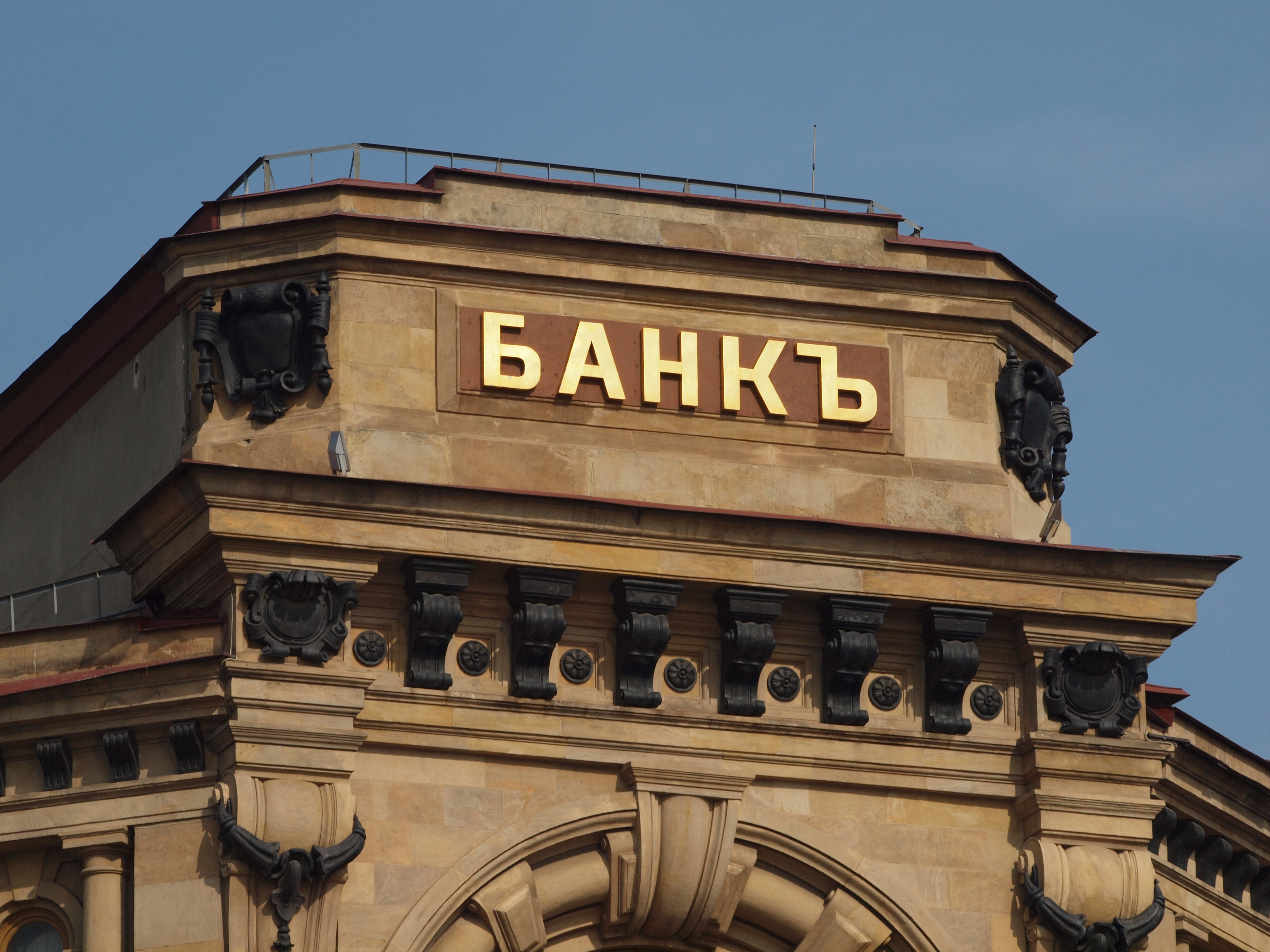 Московский Международный торговый банк (Банк Л.С. Полякова) - Соединенный банк: Рождественка ул., дом 8/15, строение 3, Мещанский, Центральный округ, Москва